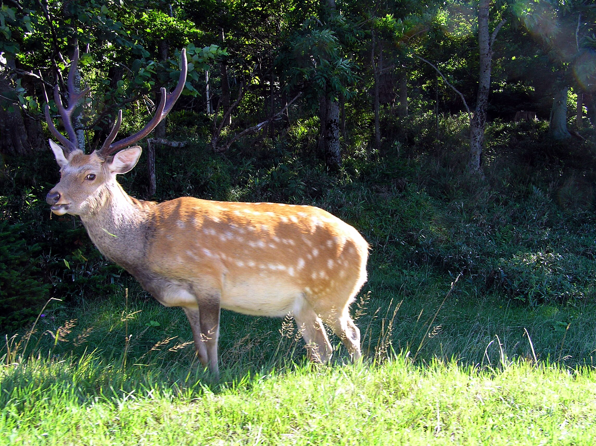 Japaneese deer at Hokkaido.